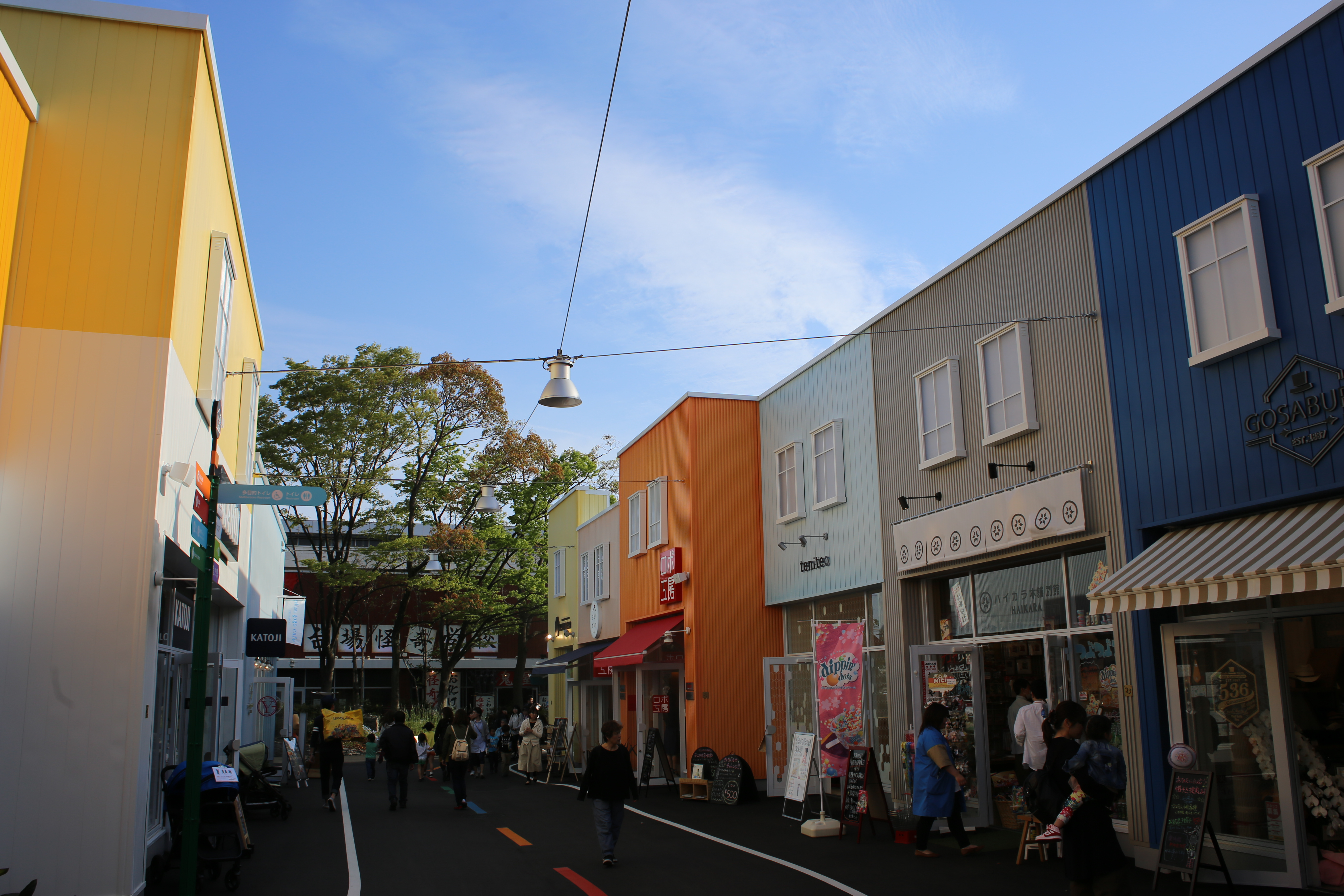 名古屋市港区金城ふ頭のメイカーズピア